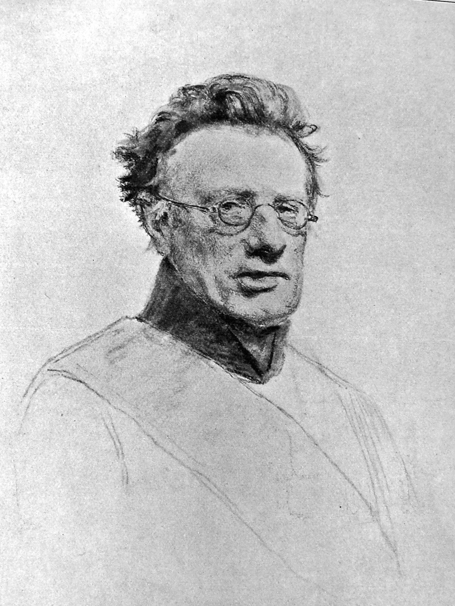 Christian Albrecht Bluhme (27. december 1794 - 16. december 1866), dansk politiker, jurist og minister.